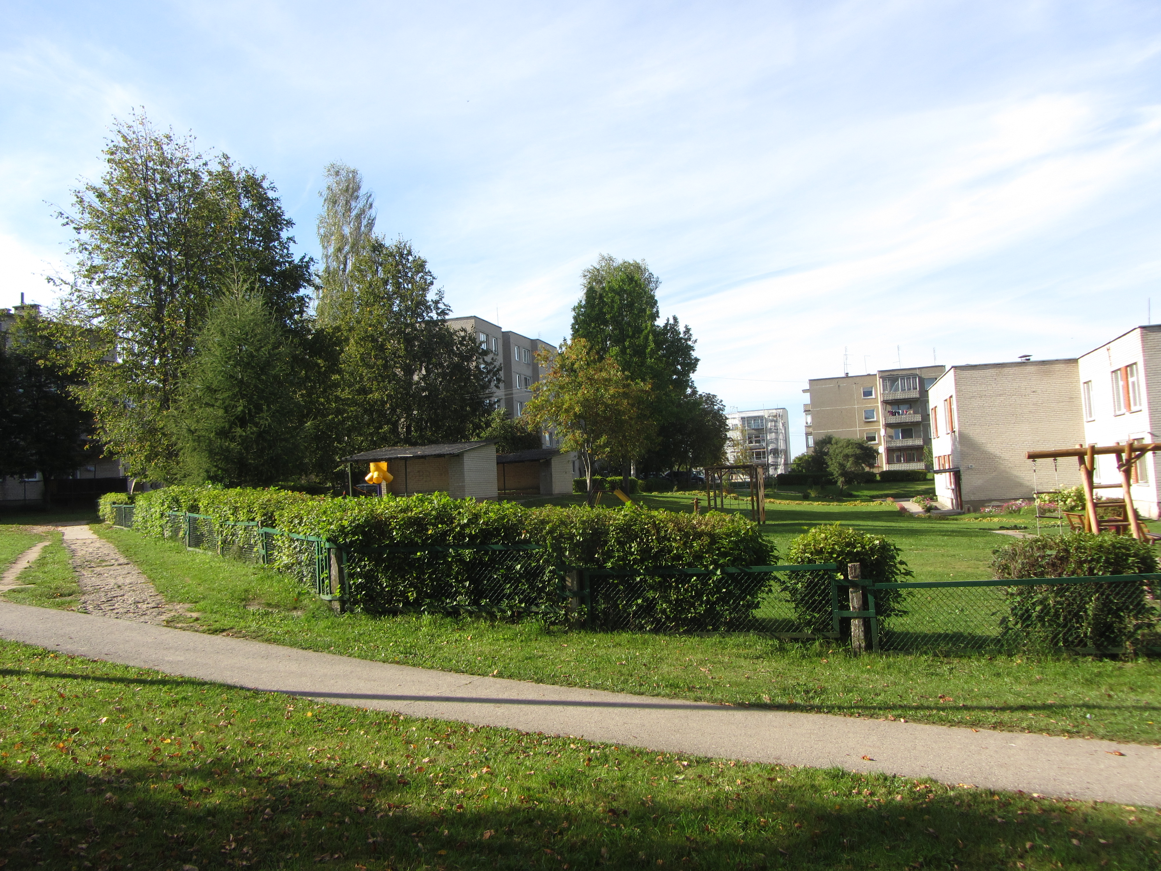 Vidiškės, Lithuania